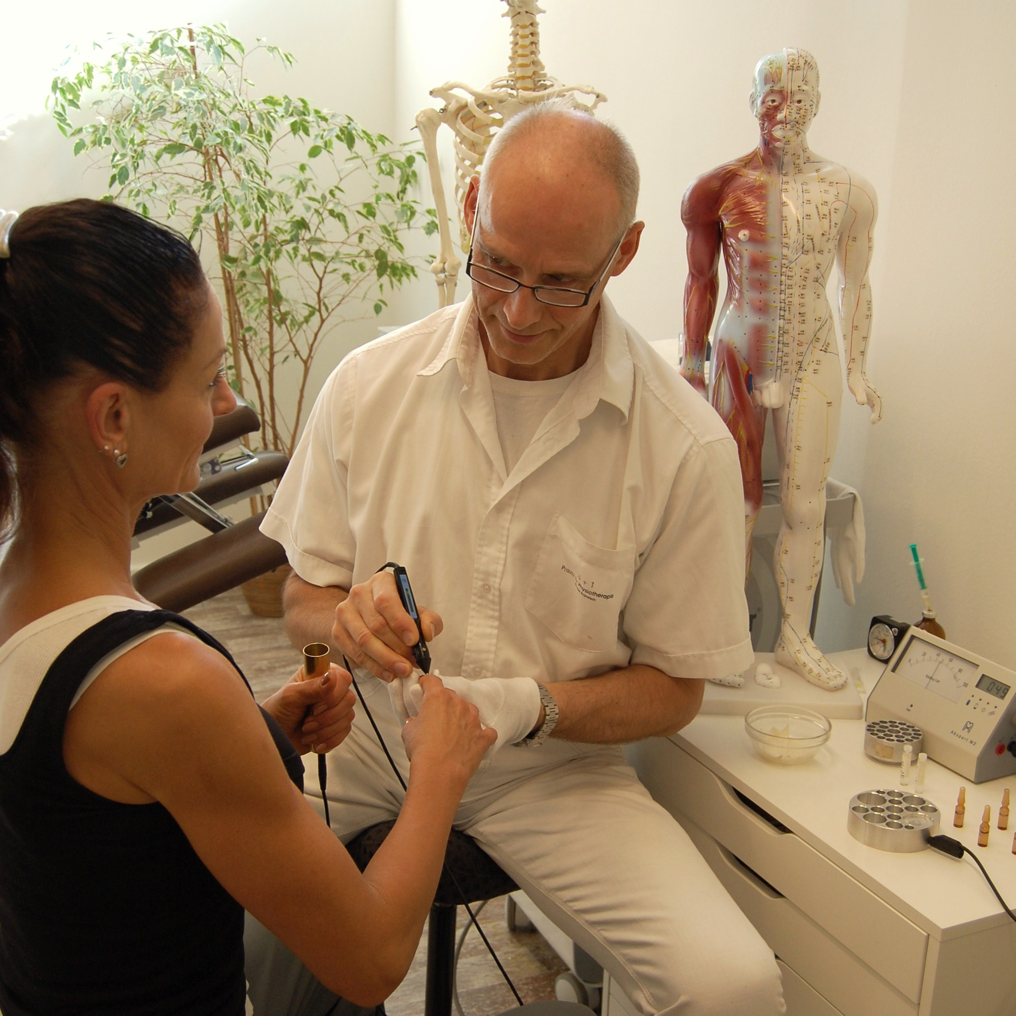 Anwendung der Elektro-Akupunktur nach Dr. Voll